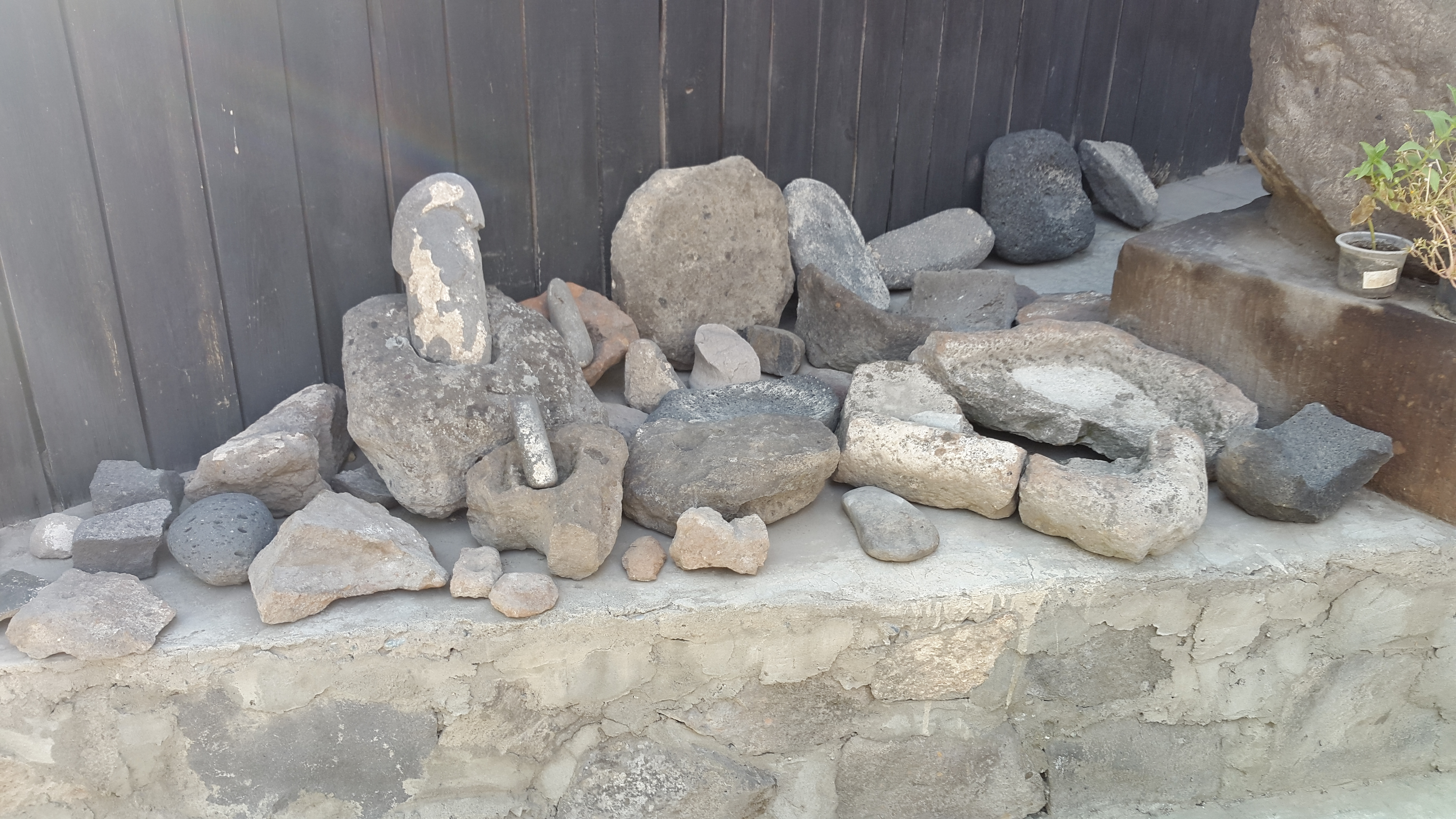 Բնակատեղի Շենգավիթ 11/2